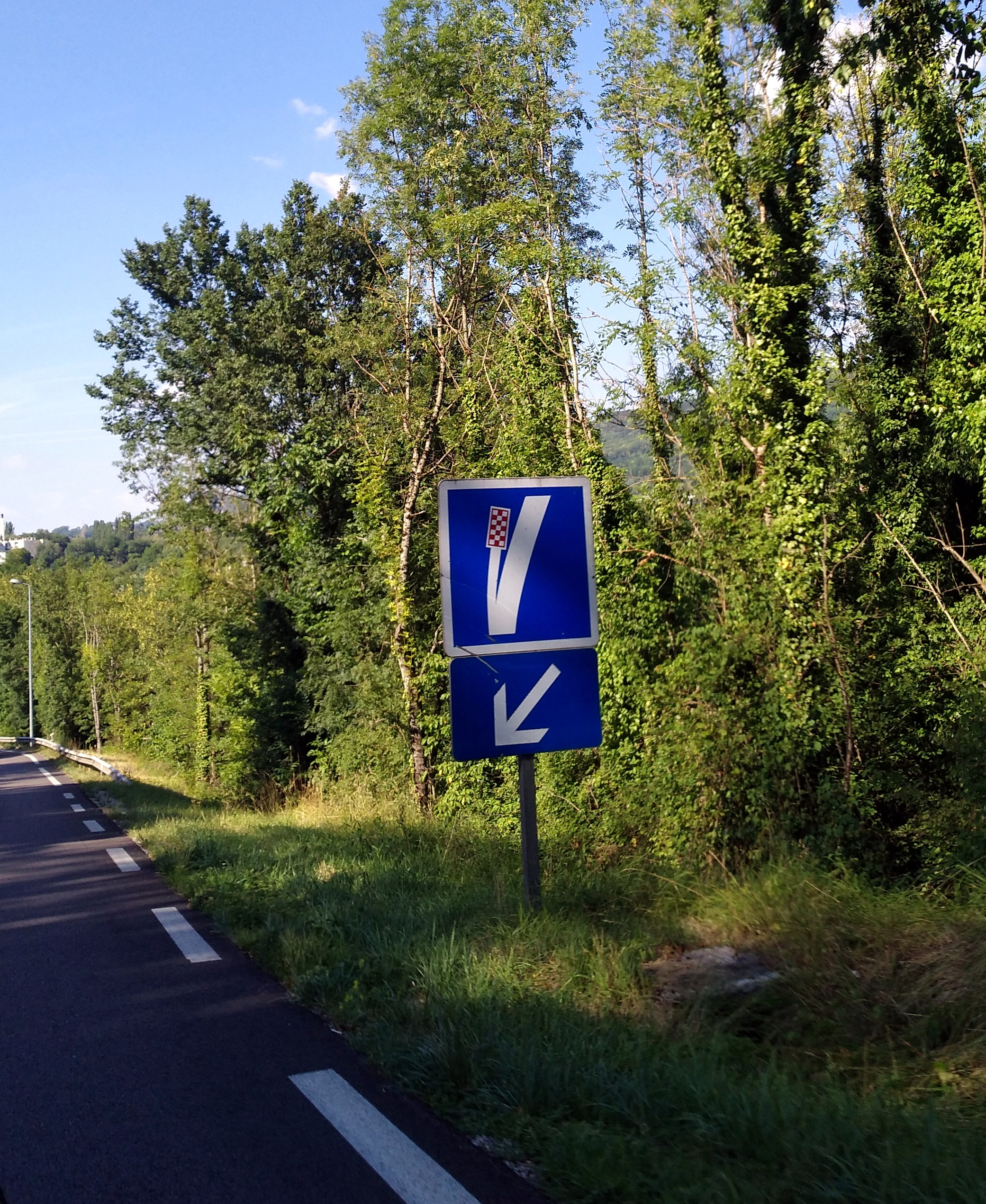 Panneau de type C26b indiquant une voie de détresse à gauche à Montaigu (Jura, France).